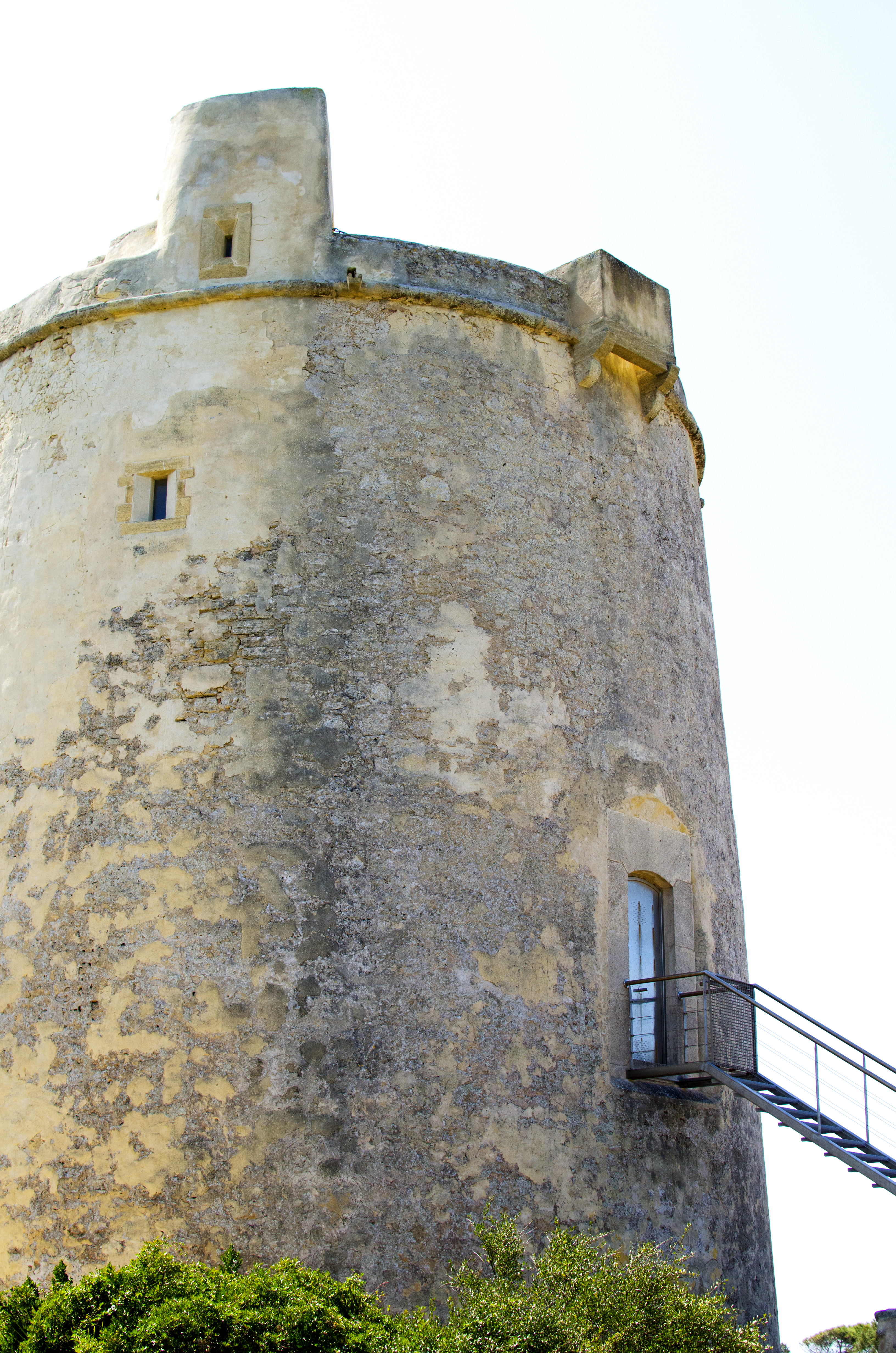 Parque natural de La Breña y Marismas del Barbate This is a photography of a Site of Community Importance in Spain with the ID: ES6120008. Natura2000 entry, EEA entry